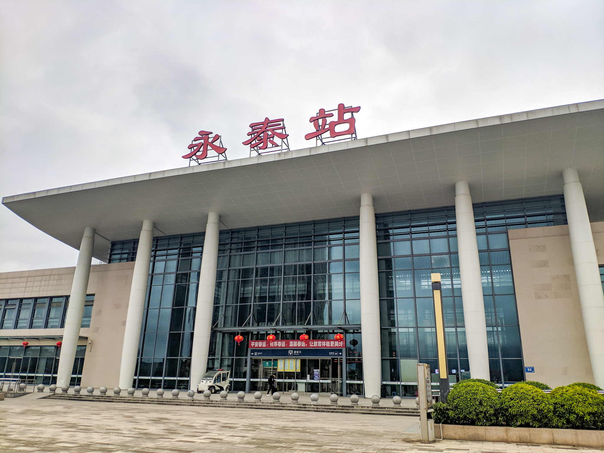 永泰站站房